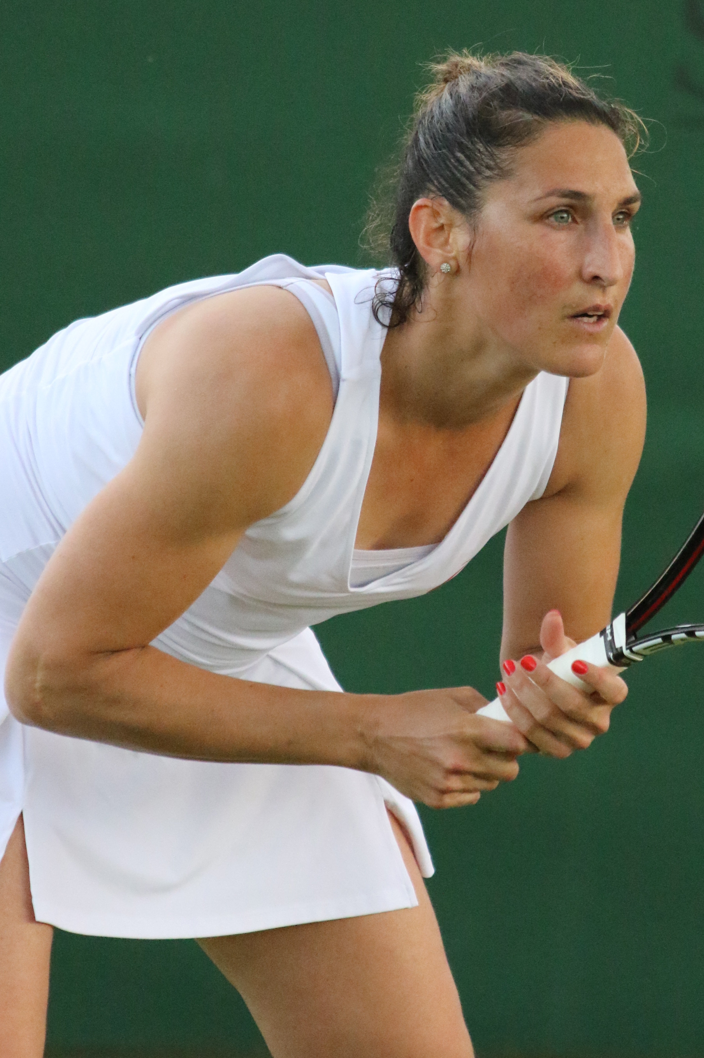 Razzano WMQ16 (6)